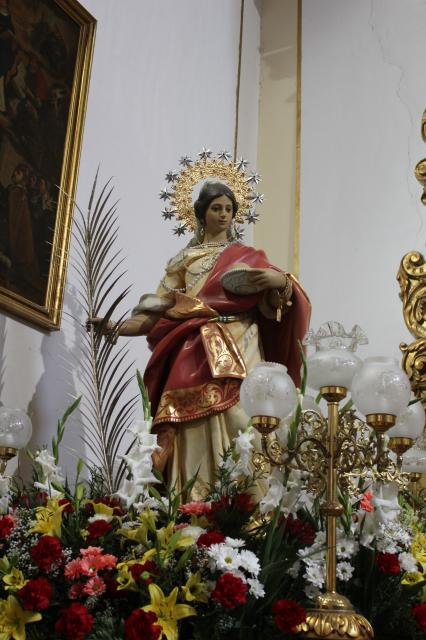 Patrona de Pinarejo, festividad principal 5 de enero, fiestas de verano 11 de septiembre.